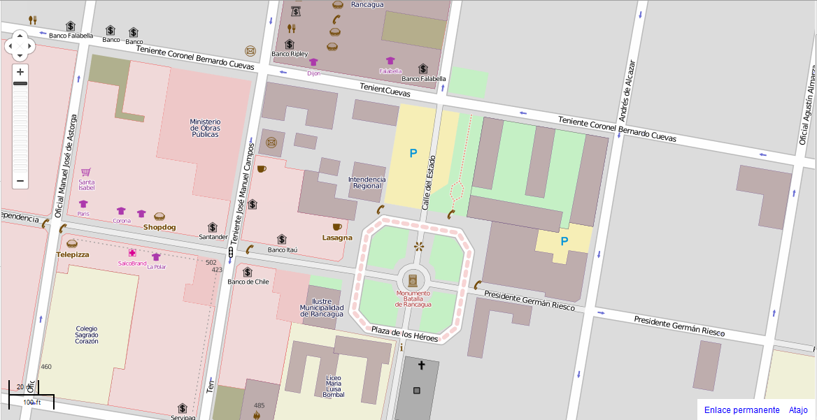 Carta detalle de la Plaza de los Héroes, Iglesia de la Merced de Rancagua This map may be incomplete, and may contain errors. Don't rely solely on it for navigation.